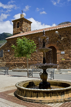 Plaza de Sierra Madre en Solana del Pino Plaza de Sierra Madre en Solana del Pino Plaza de Sierra Madre en Solana del Pino